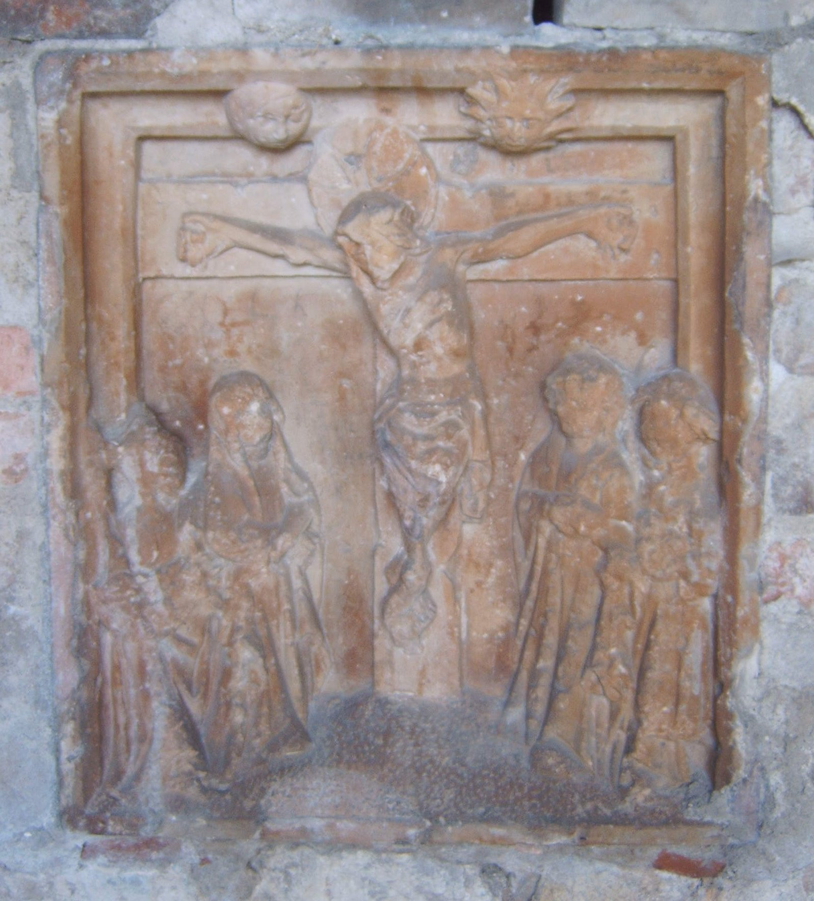 Sandsteinrelief (15. Jahrh.) in der der St.-Stephanus-Kirche Westerhüsen